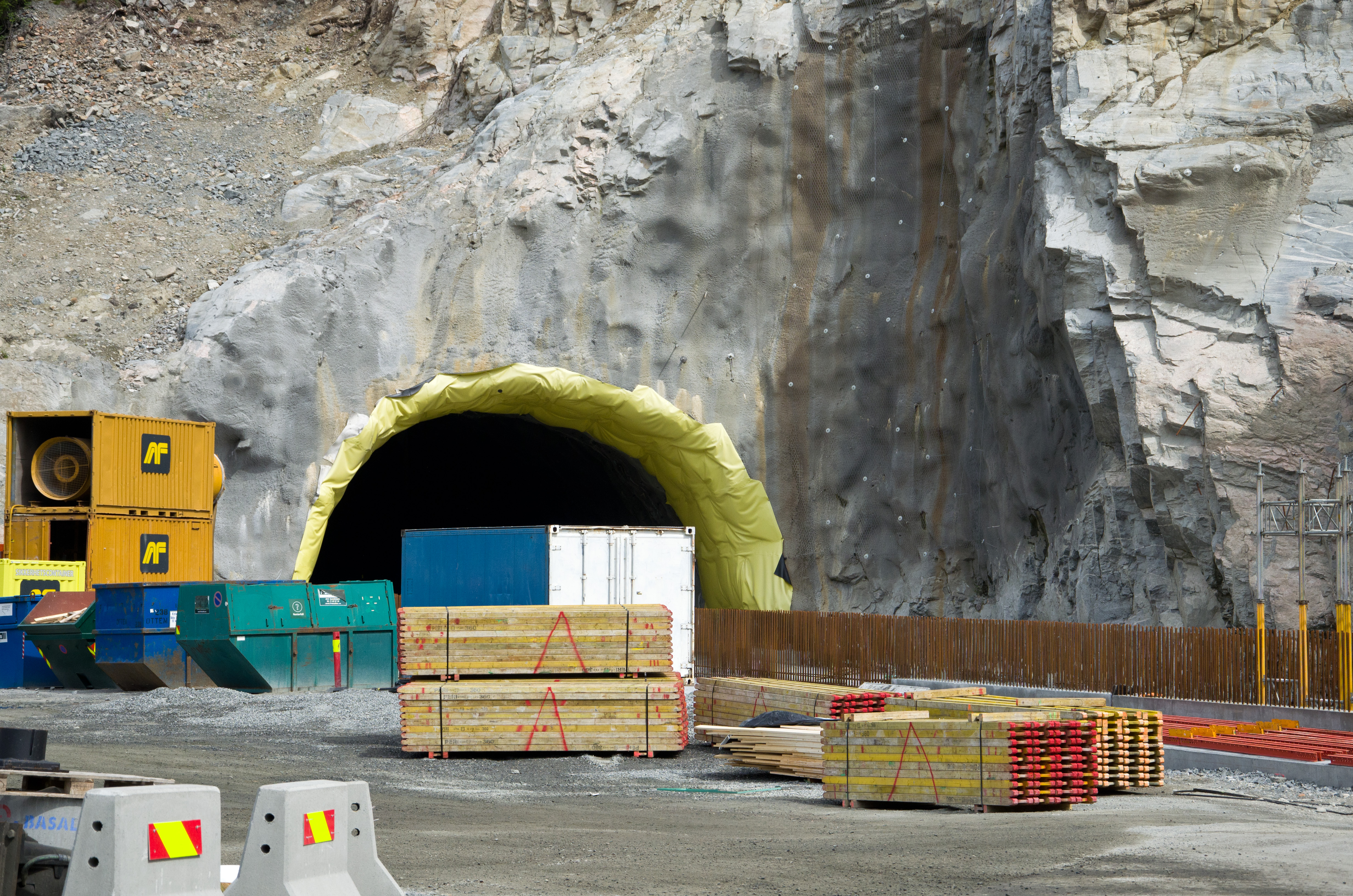 Oppdølstrandtunnelen bygges, juli 2012. Tunnelen blir riksvei 70 mellom Sunndalsøra og Ålvundeid, og den forventes ferdig 2014. Dette er søndre innslag.